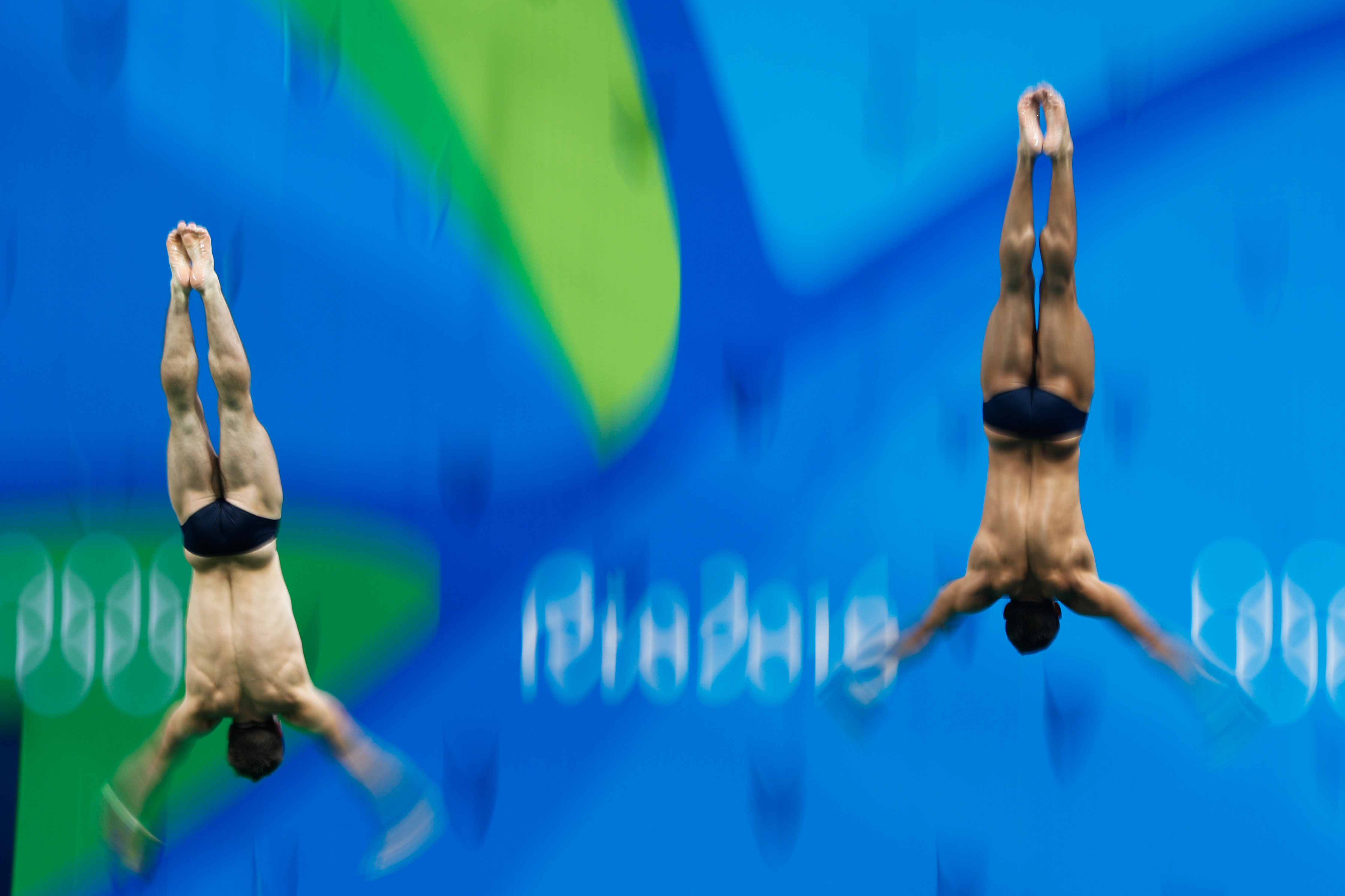 Rio de Janeiro - Norte-americanos Sam Dorman e Mike Hixon levam a prata no trampolim de 3 metros sincronizado dos saltos ornamentais nos Jogos Rio 2016, no Parque Aquático Maria Lenk (Fernando Frazão/Agência Brasil)